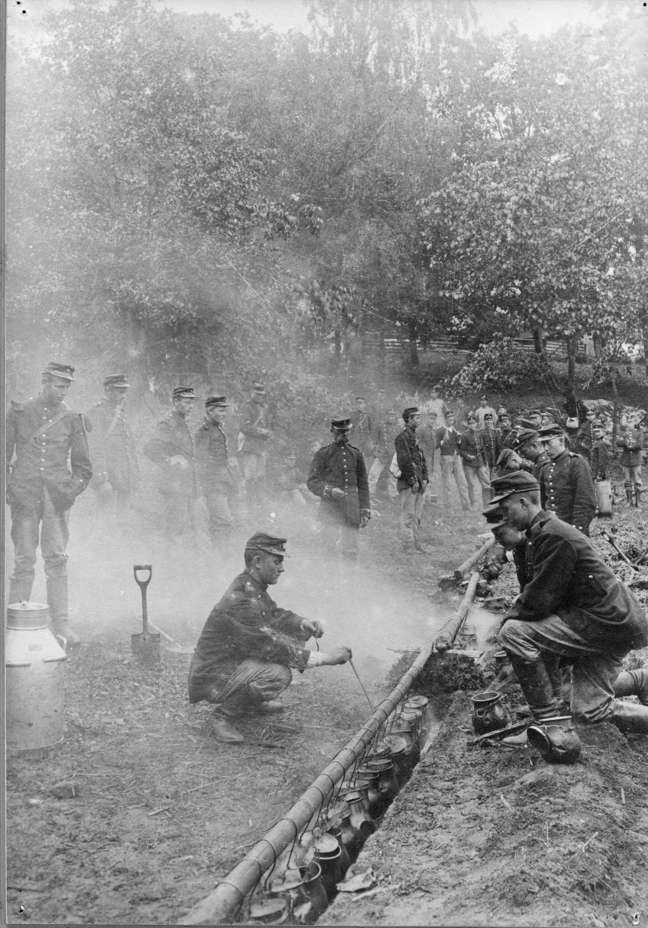 Matlagning i kokgrop. Okänd fotograf. Armémuseum, Stockholm, Sweden # AMA.0010634.